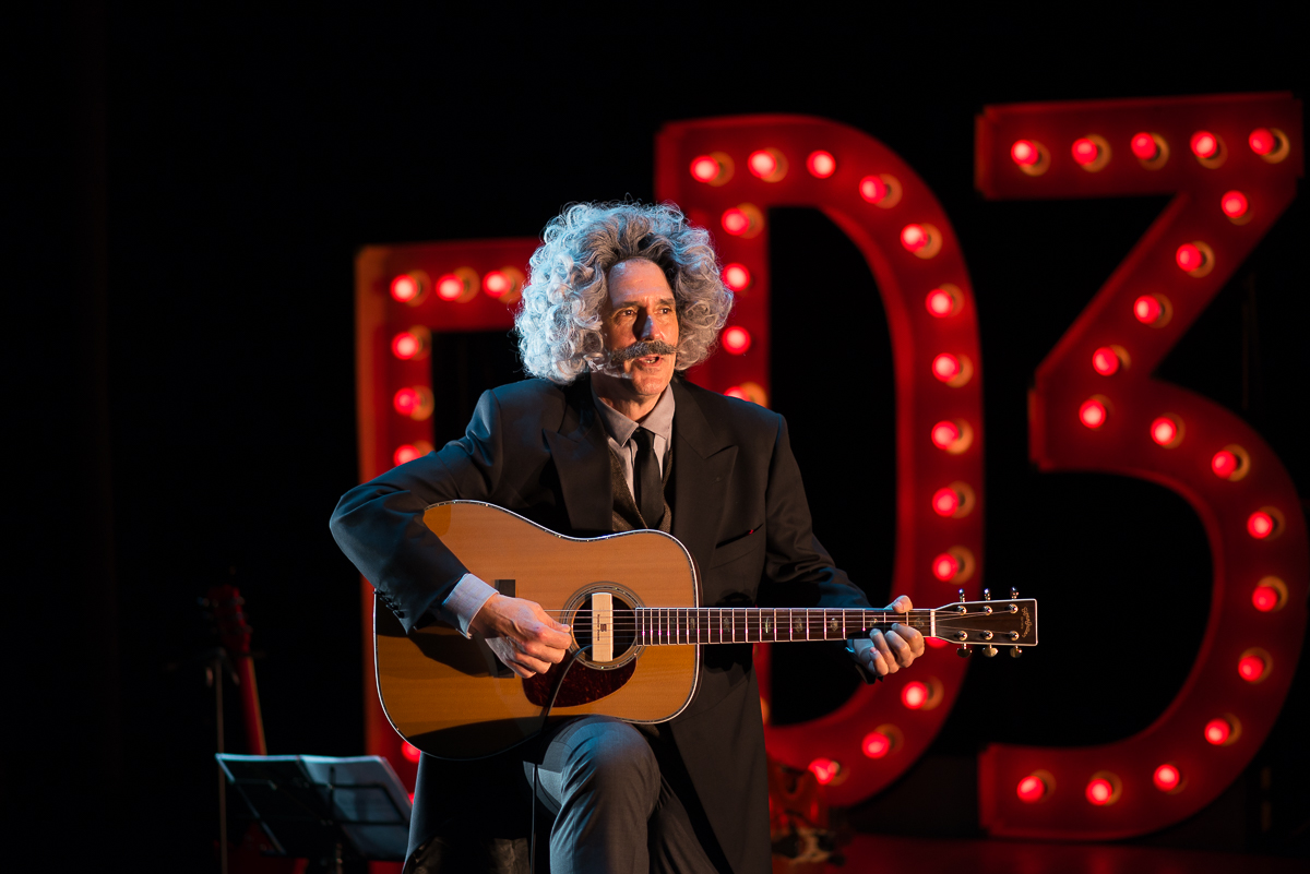 Patxo Telleria aktoreak Ez Dok Hiru obra errepresentatzen.